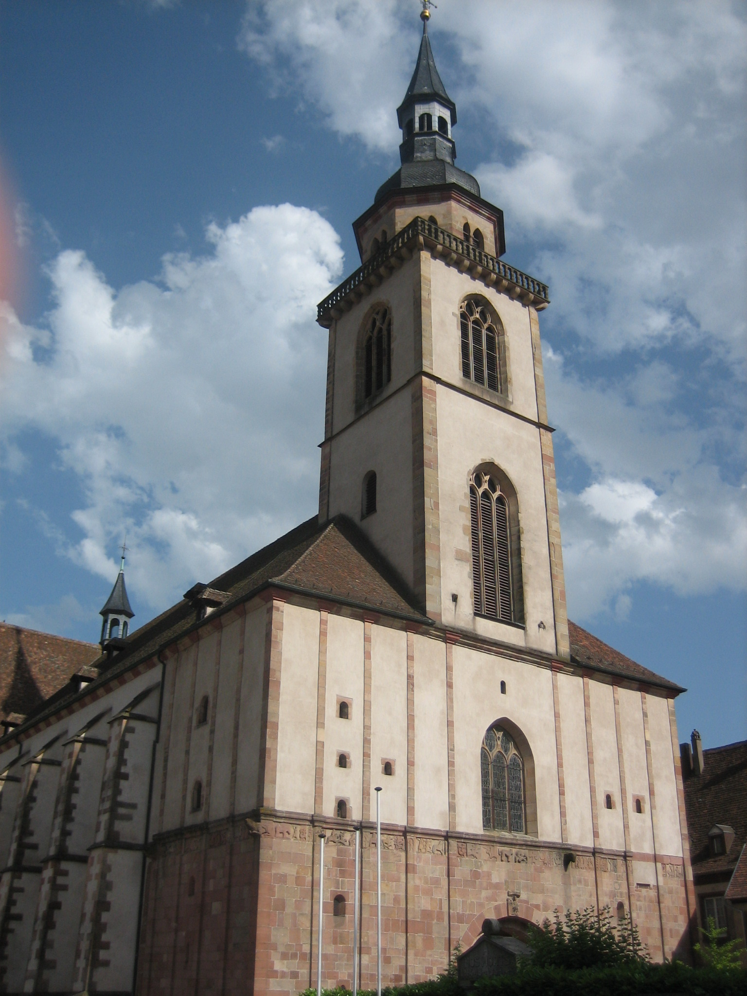 Église Saint-Pierre-et-Paul à Andlau (France, région Alsace).